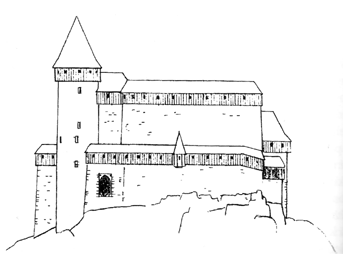 Beschreibung: Burg Orlík nad Vltavou. Rekonstruktionsversuch der Westfront im zweiten Viertel des 15. Jh. *Quelle: Varhaník 1998, 30 Abb. 23; *Lizenzstatus: GNU FDL. Kategorie:Bild:Burg